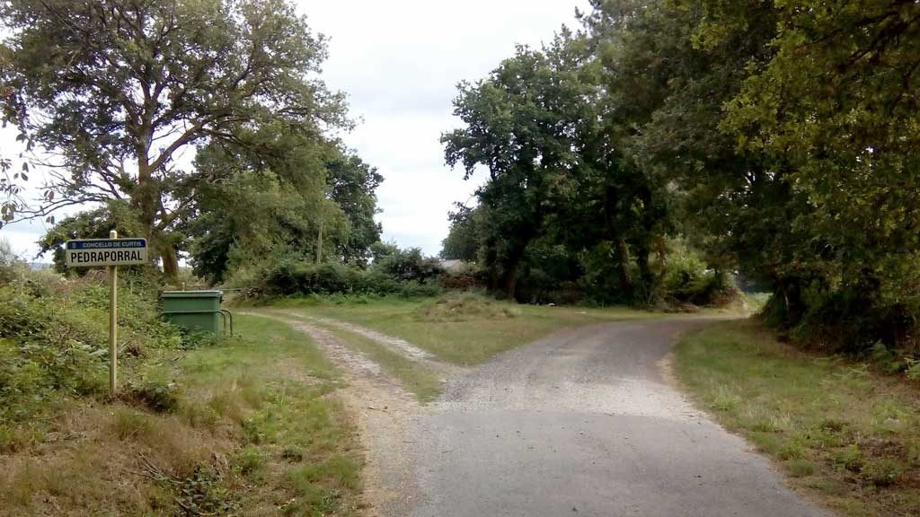 Vista de Pedraporral, Curtis.